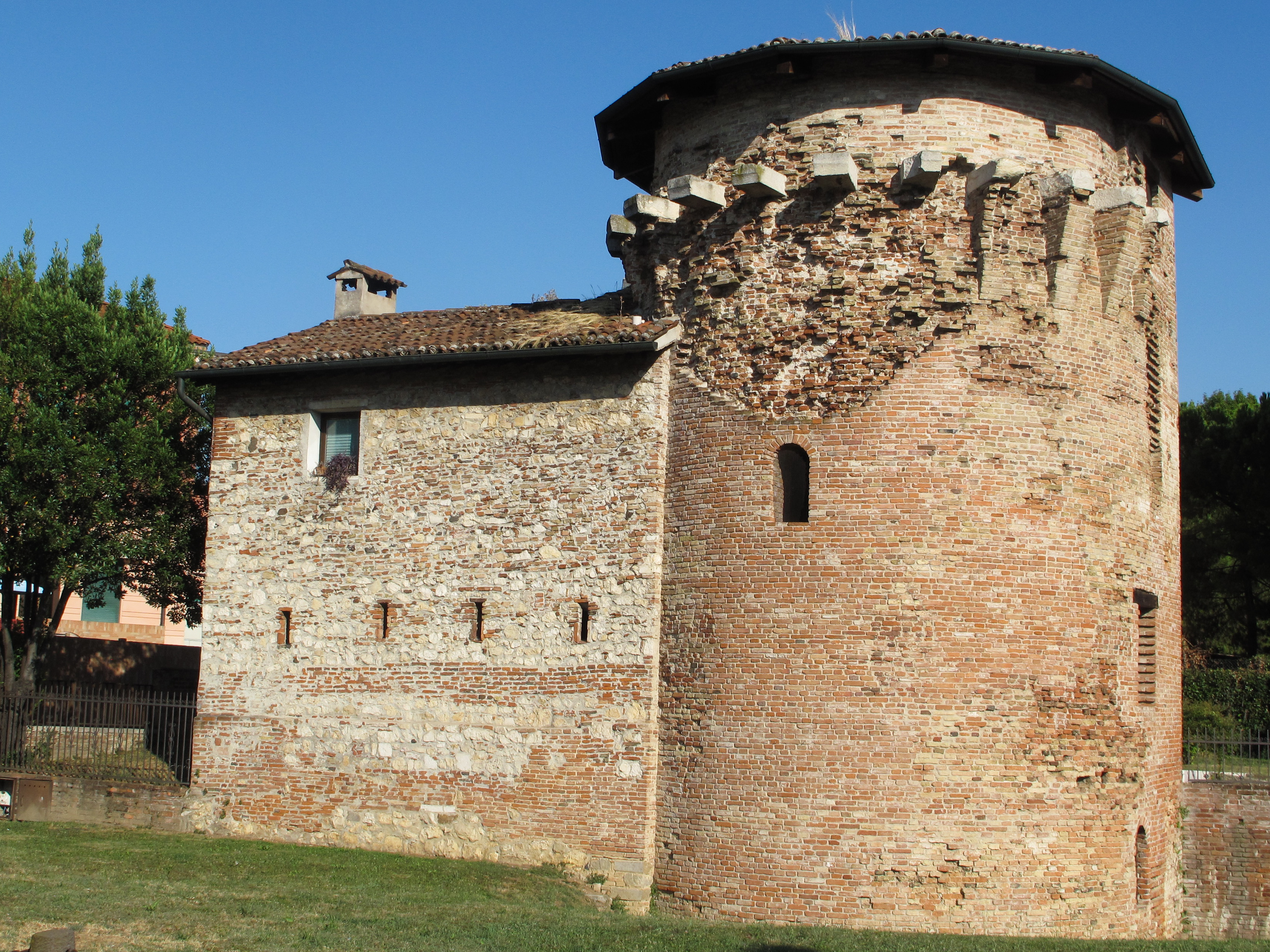 Vicenza - Mura veneziane - Torrione presso Porta S. Croce